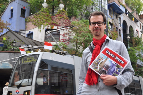 Arno Steinwender vor ULF der Wiener Linien mit Gesellschaftsspiel